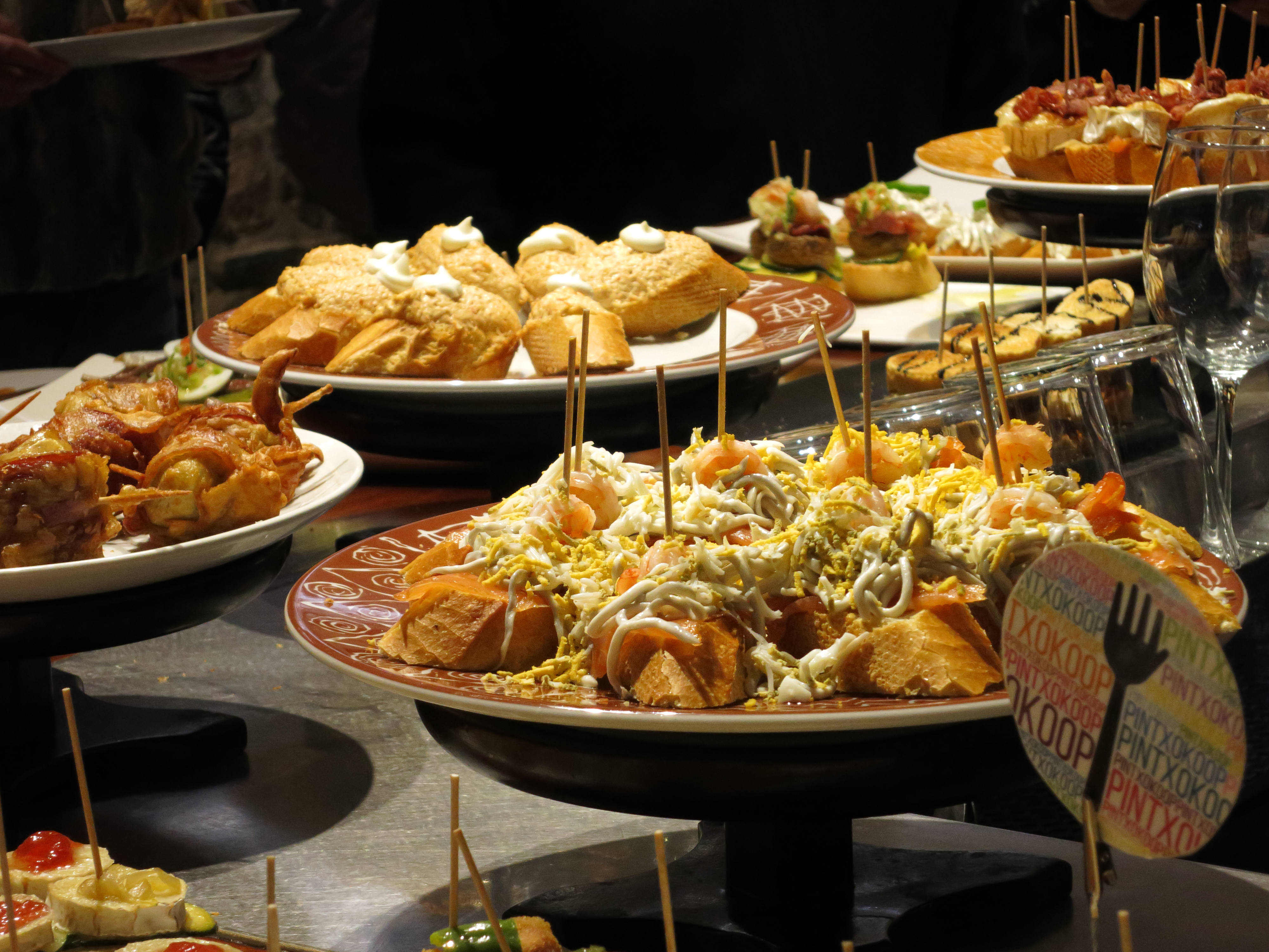 Barra de pinchos en un bar de Donostia-San Sebastián, País Vasco, España